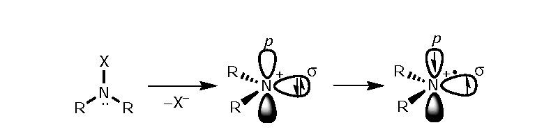 Costruzione del catione nello stato singoletto e tripletto partendo dal composto neutro (Ad esempio dall'ammoniaca)